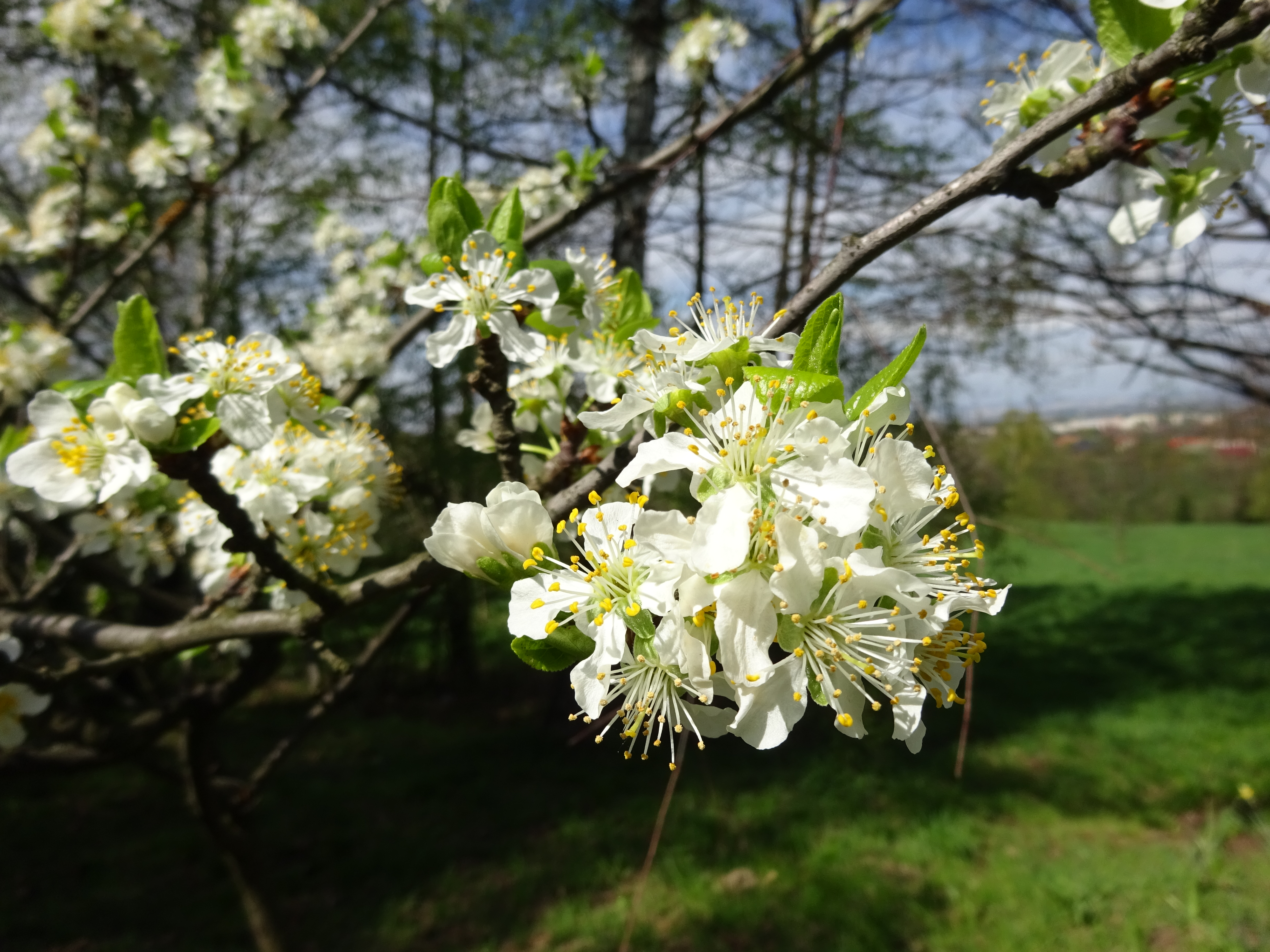 Kwiaty Czereśni wiosną w kwietniu na Lednicy Górnej koło Krakowa. 2016